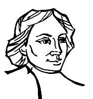 The La Salle